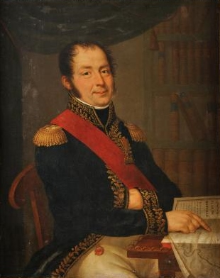 Augustin Darricau, général et comte de l'Empire (1773-1819).